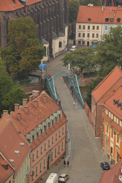 Widok na Most Tumski z Katedry